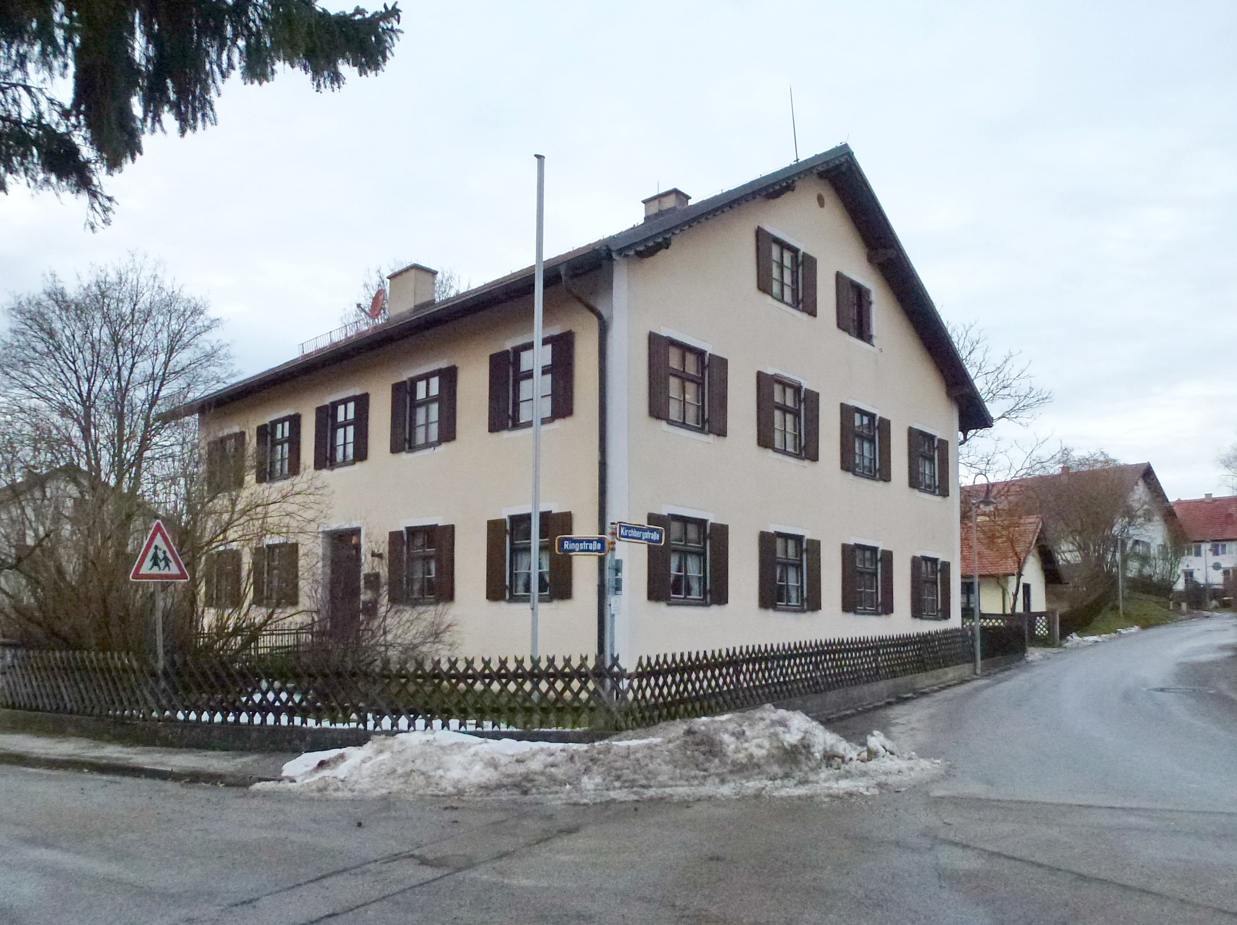 Ehemaliges Pfarrhaus gegenüber der Kirche, modernisiert. Ansicht von SO